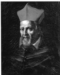 Портрет кардинала-епископа Пьер Паоло Крешенци (1572 -1645).